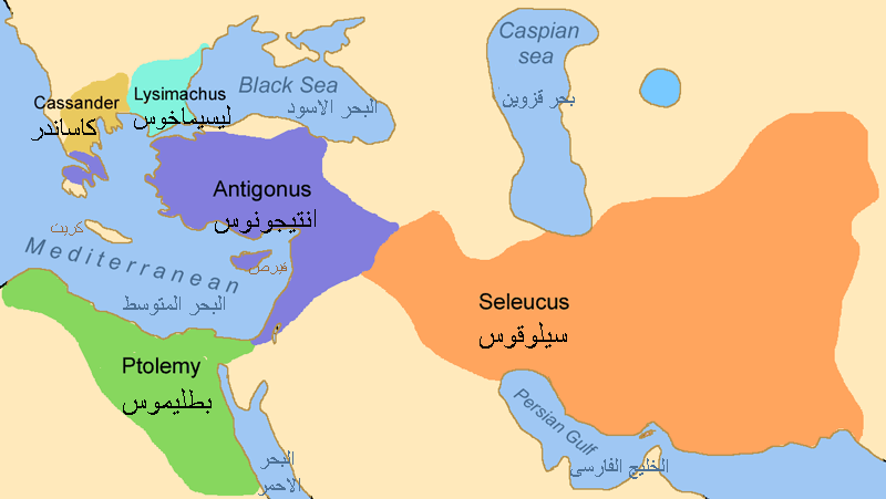 Map